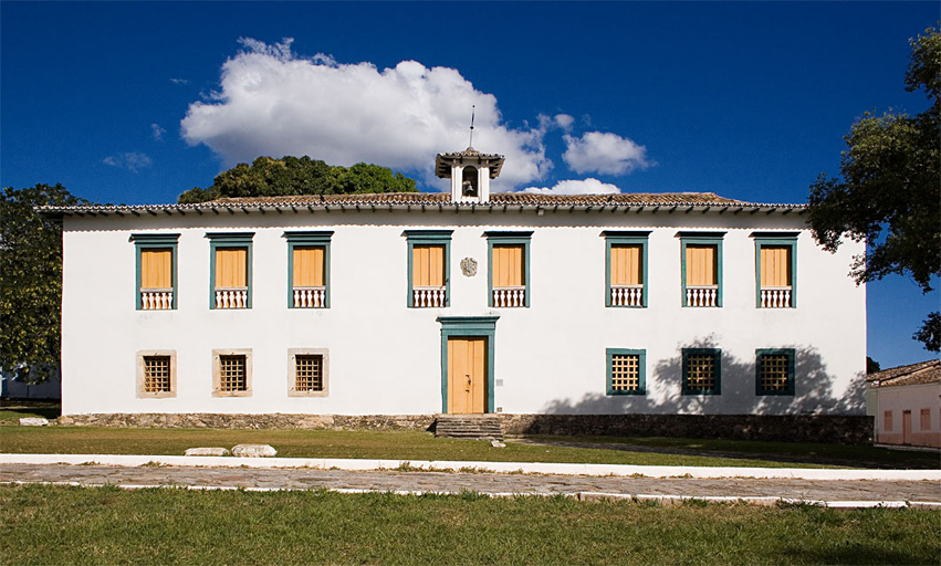 Endereço: Praça Brasil Ramos Caiado, Setor Central – Cidade de Goiás – GO. Tel: (62) 3371-1087 Horários a partir de 2 de janeiro de 2013: De terça-feira a sábado, das 9h às 18; e domingos e feriados, das 9h às 15h Foto: Fernando Estankuns migre.me/cJCxT